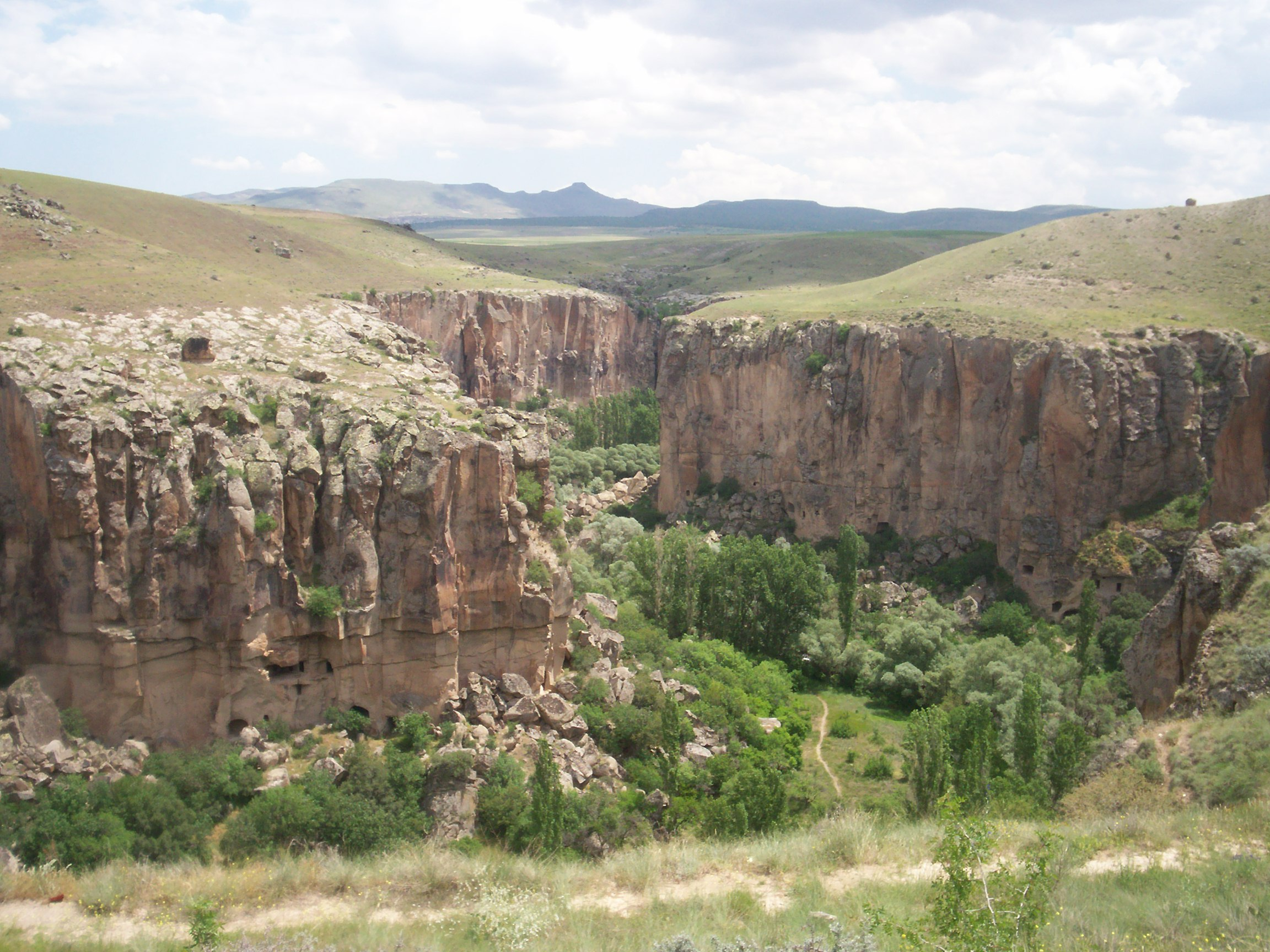 Kendi fotoğraf makinemle çektim. (Ihlara Valley, Aksaray, Turkey)